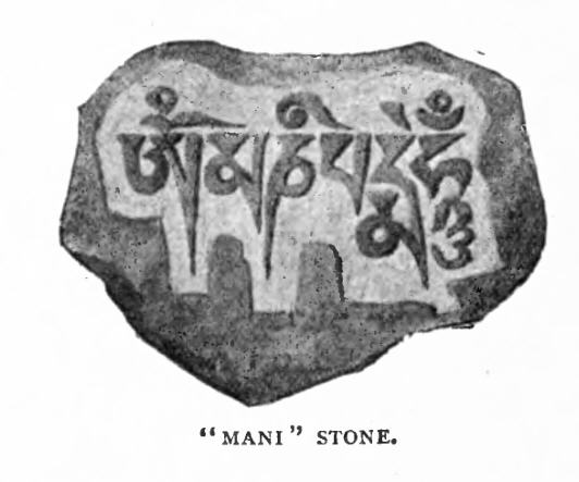 Mani stone from Ladakh